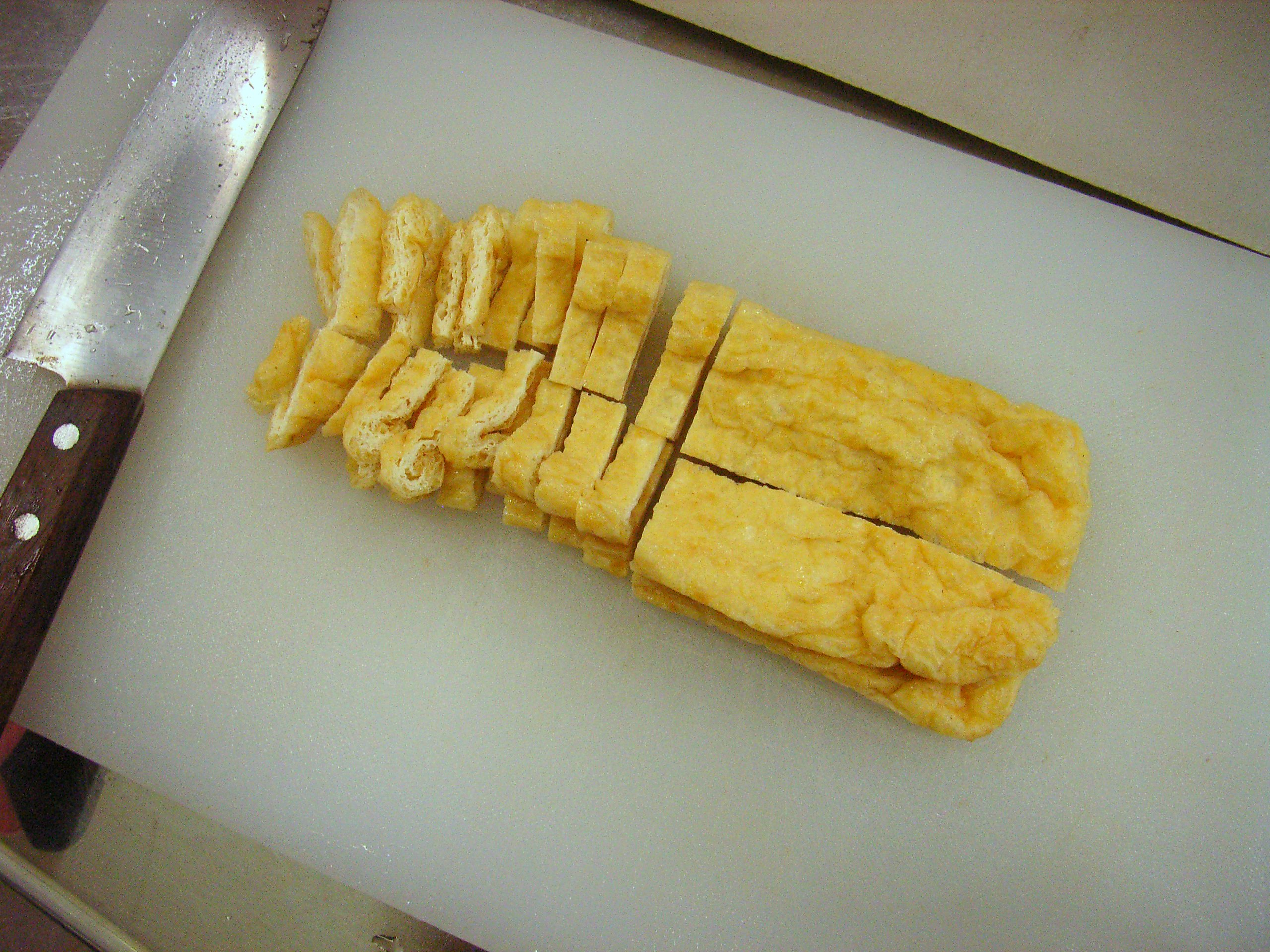 まな板上の油揚げと包丁Ton-jiru#15